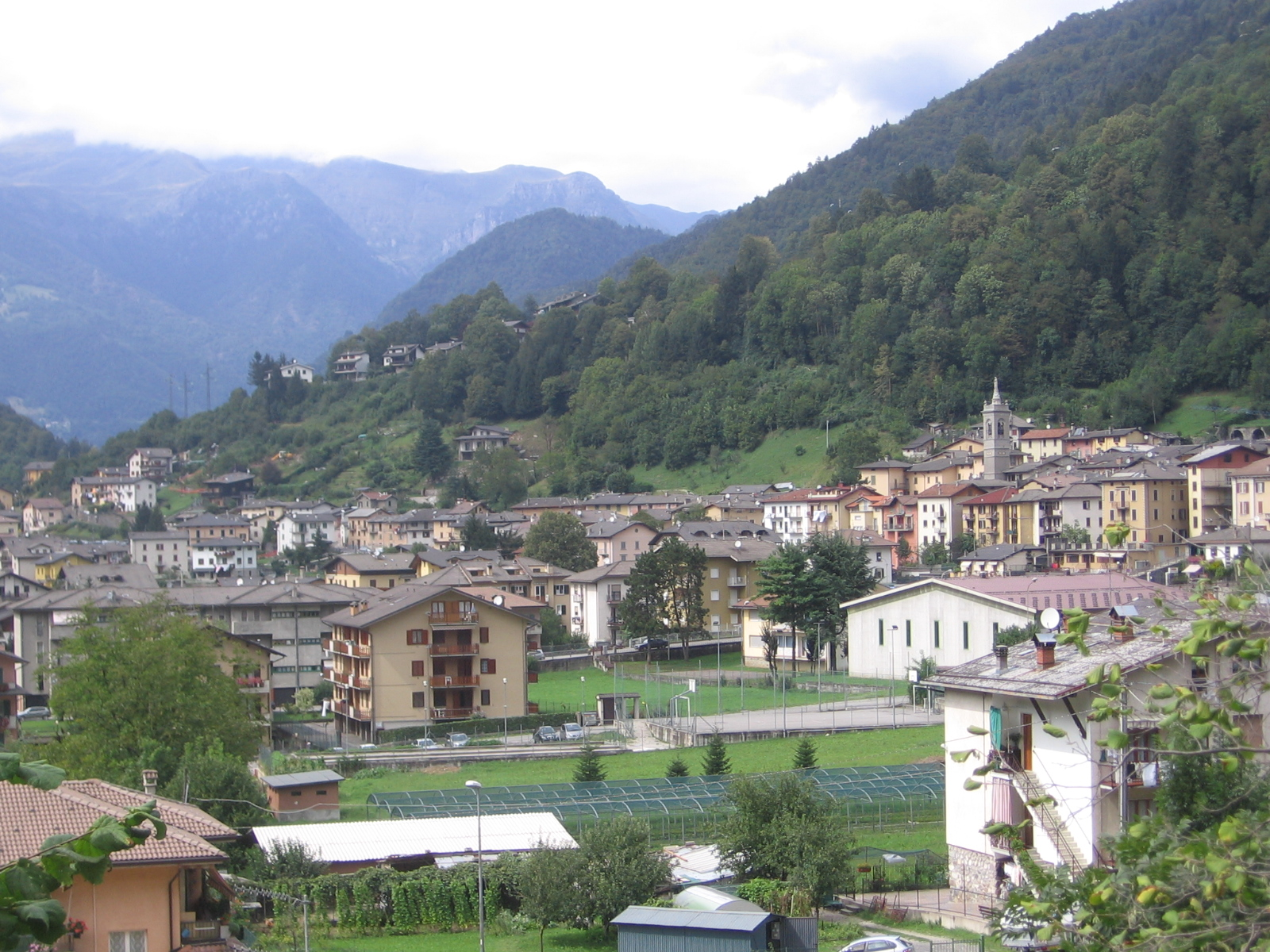 Piazza Brembana, Bergamo, Italy